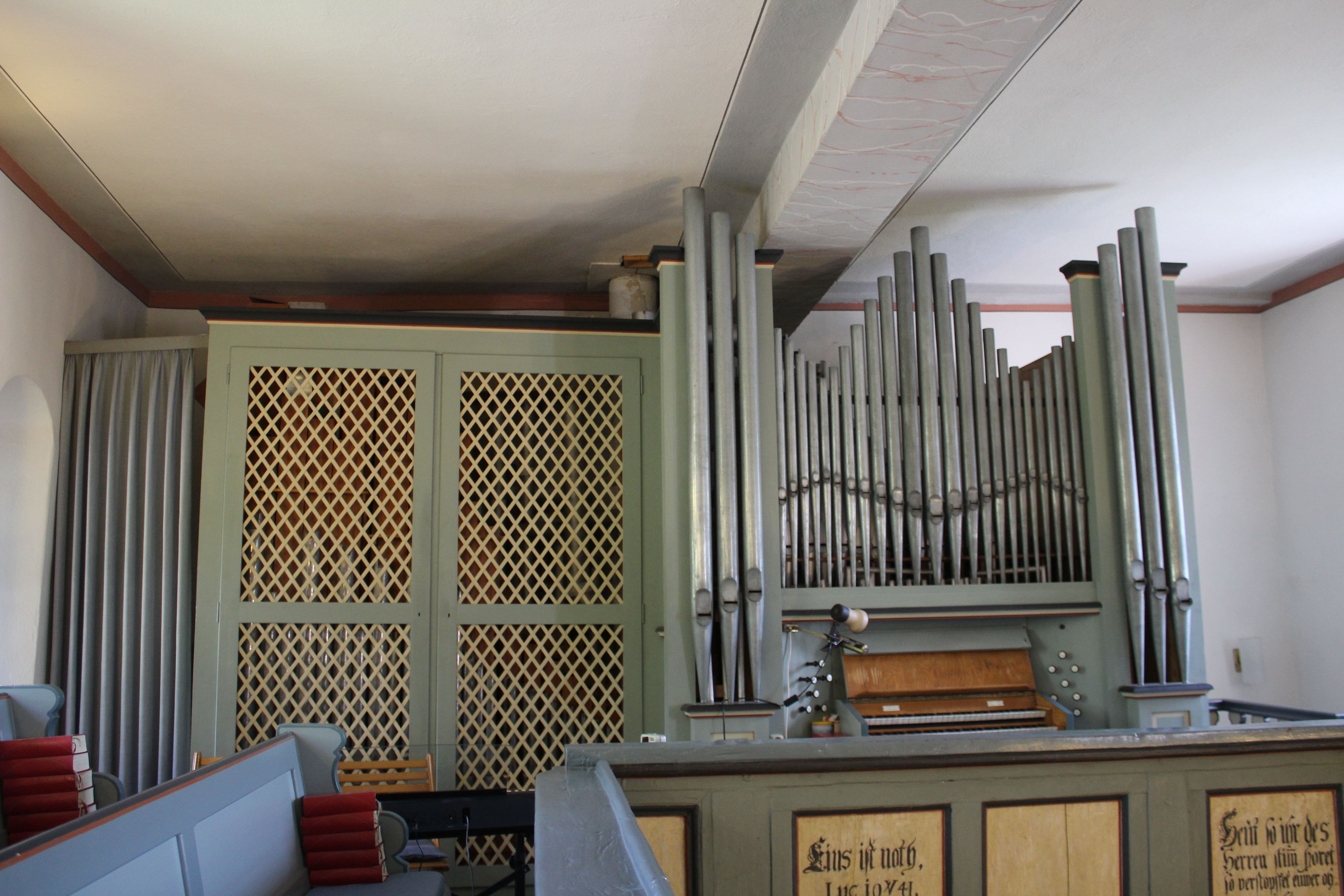 Ev. Kirche Nauborn, Wetzlar, Lahn-Dill-Kreis, Hessen, Deutschland